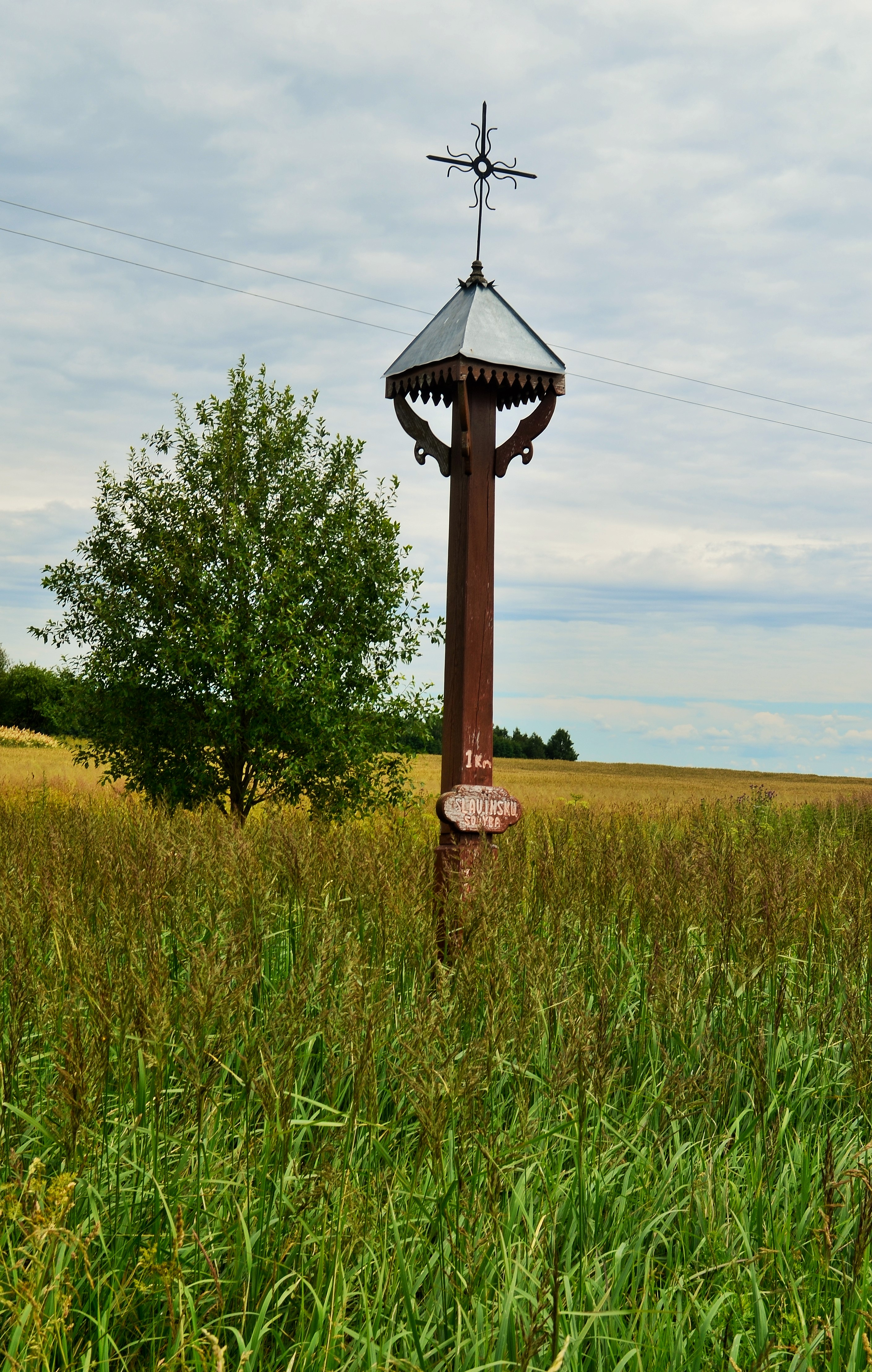 Stogastulpis Baldinkoje, Kėdainių raj.